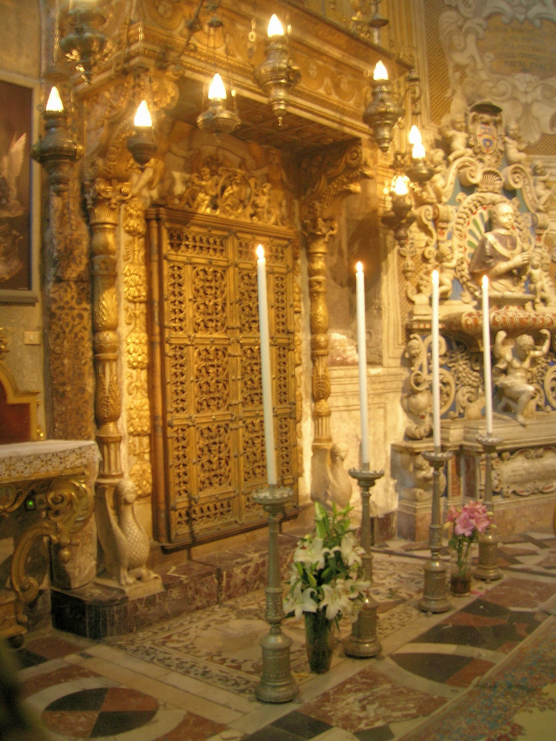 Cappella di sant'Agata, Cattedrale di Catania